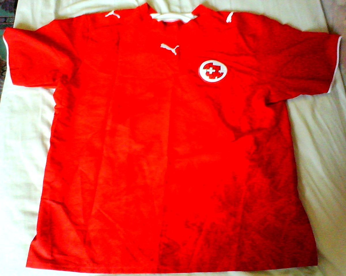 Maillot de l'équipe nationale de Suisse de football en 2006 et 2007